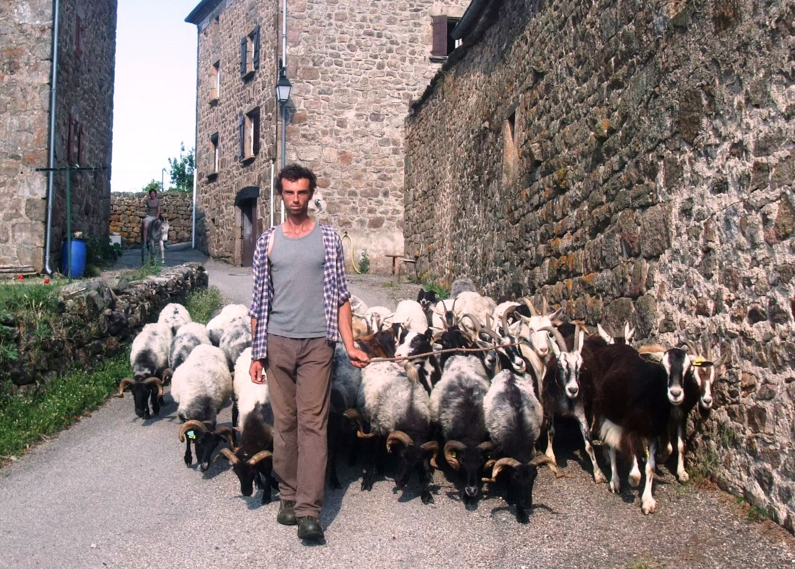 Monestier (Ardèche) troupeau village